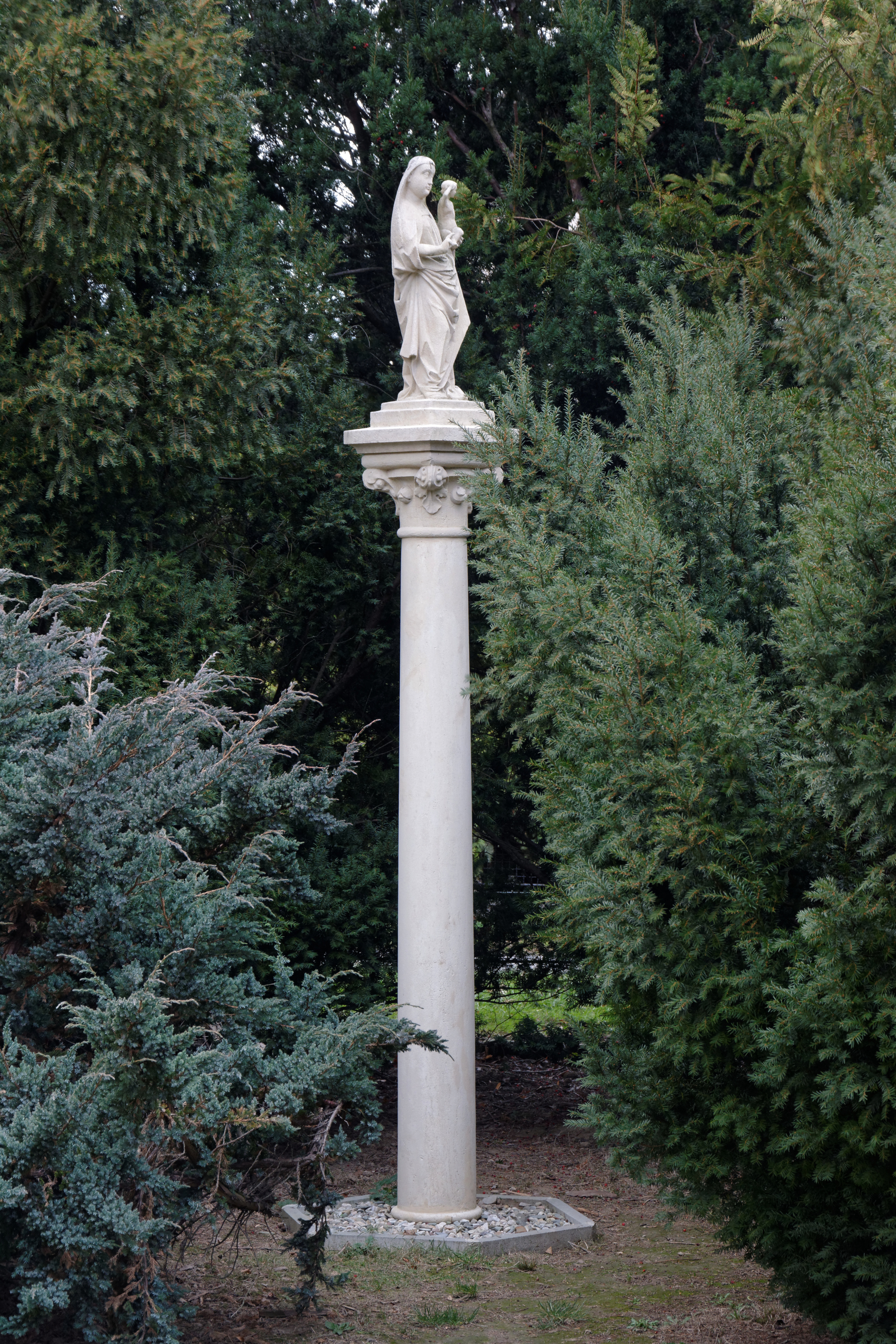 Sloup se sochou panny Marie, proti zámeckému parku, Dobroslavice.